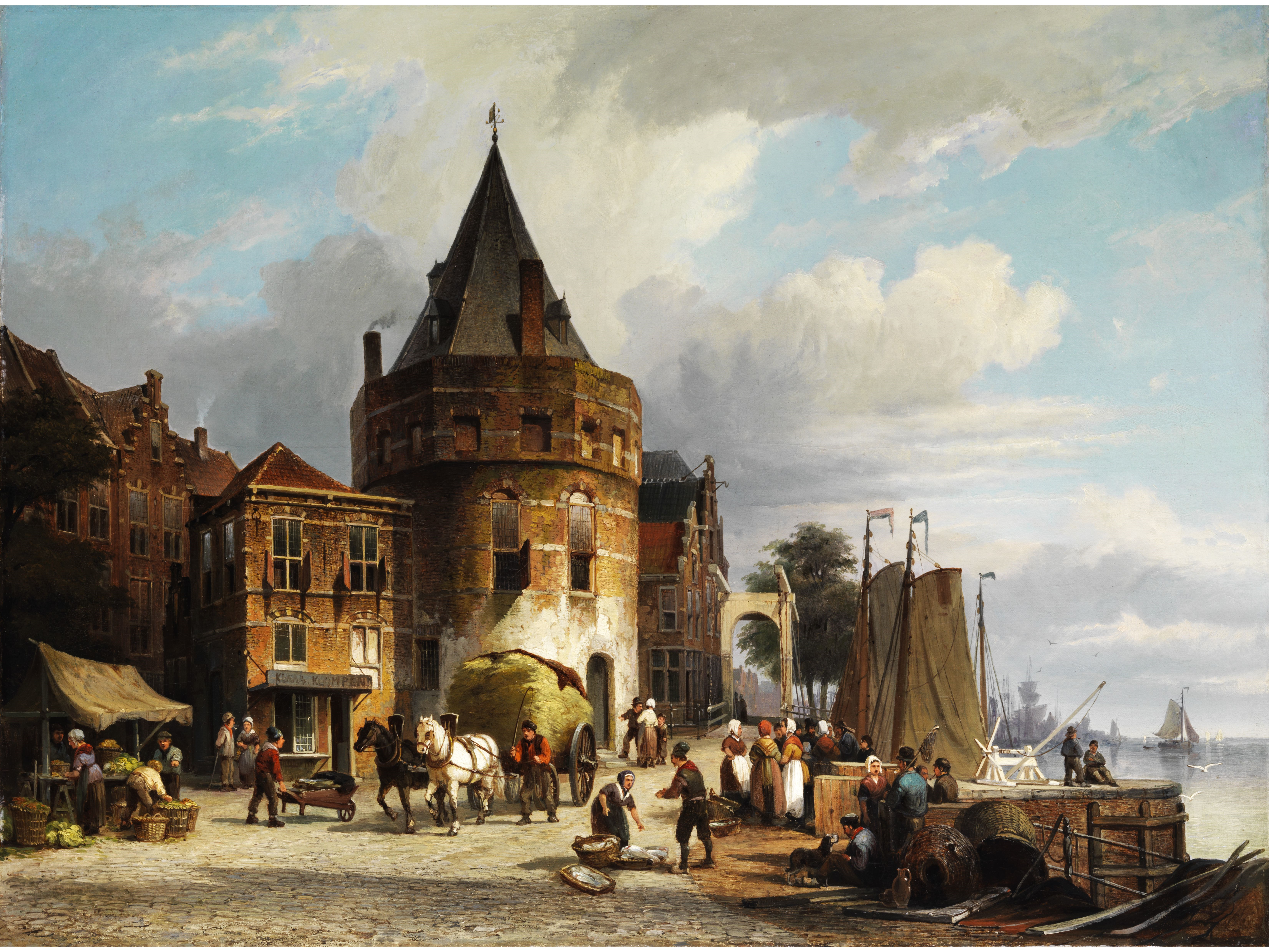 Cornelis Christiaan Dommelshuizen